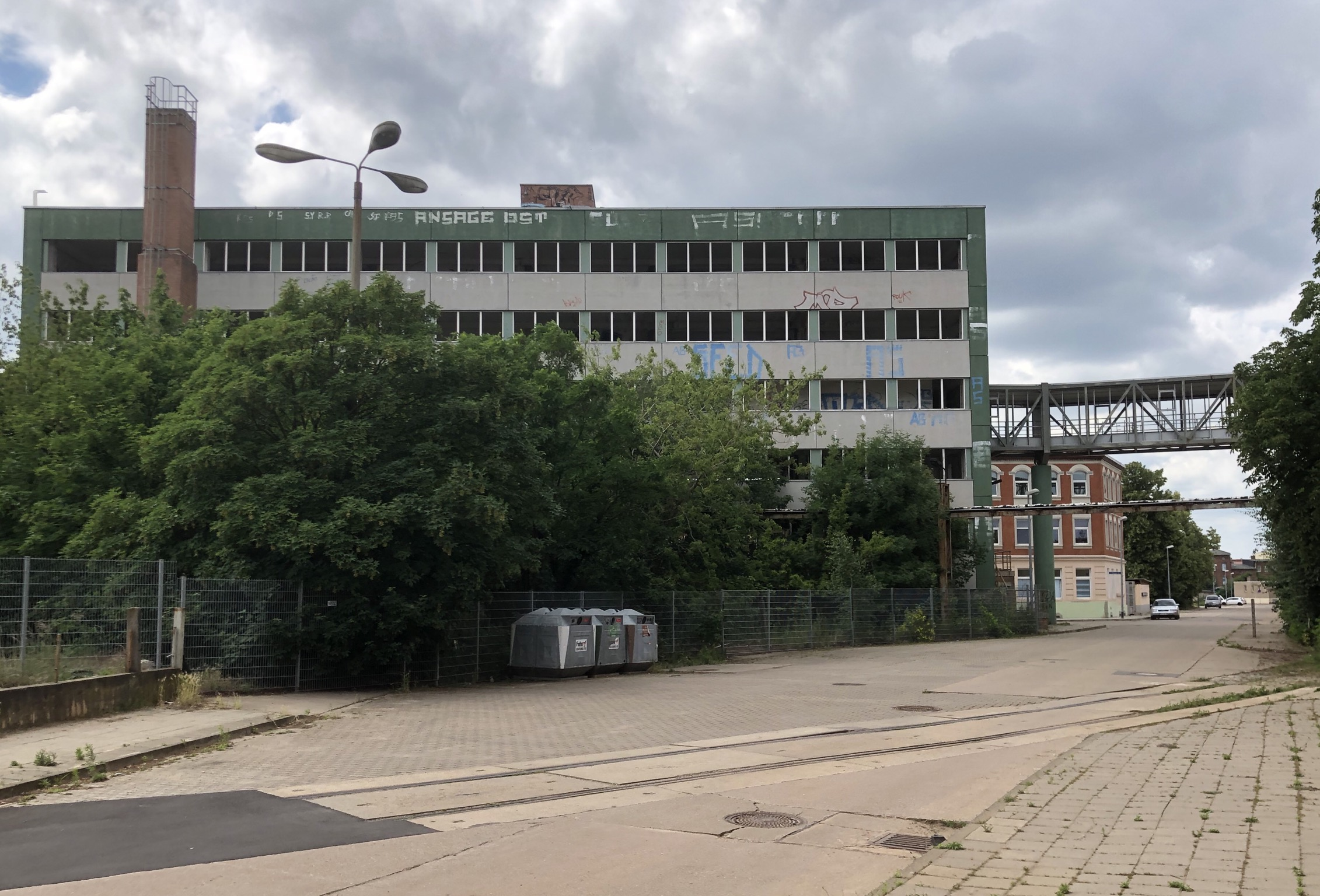 PROWIKO Paulstraße in Schönebeck